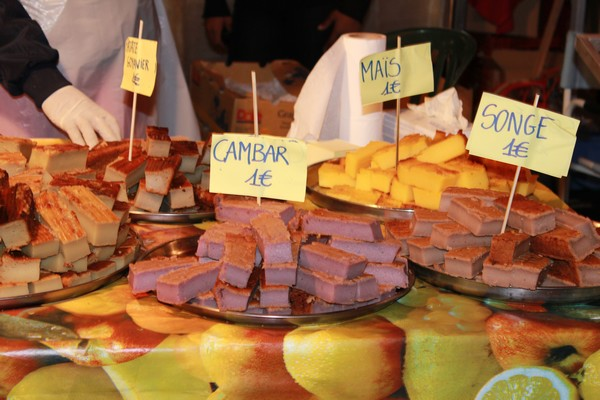 quelques douceurs de l'île